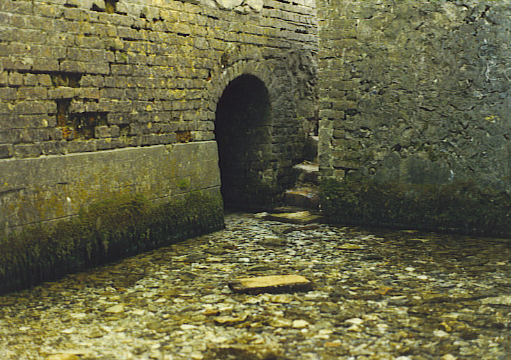 self made